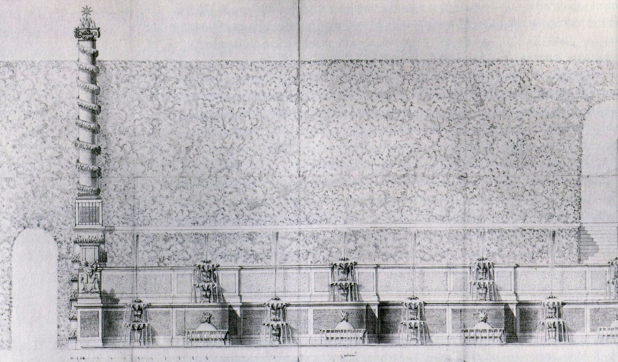 Tessins förslag till "Kaskaderna" på Drottningholm